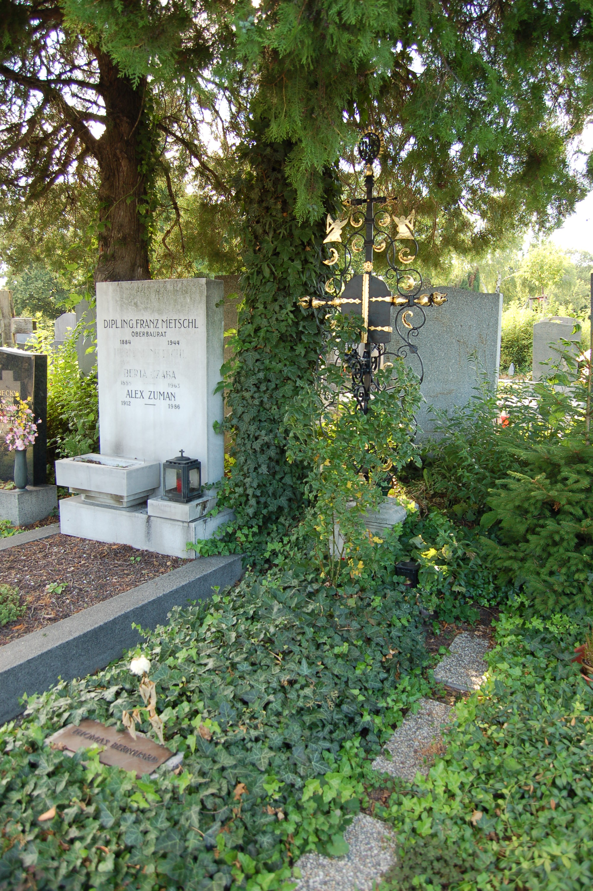 Grinzinger Friedhof, Grabmal von Thomas Bernhard